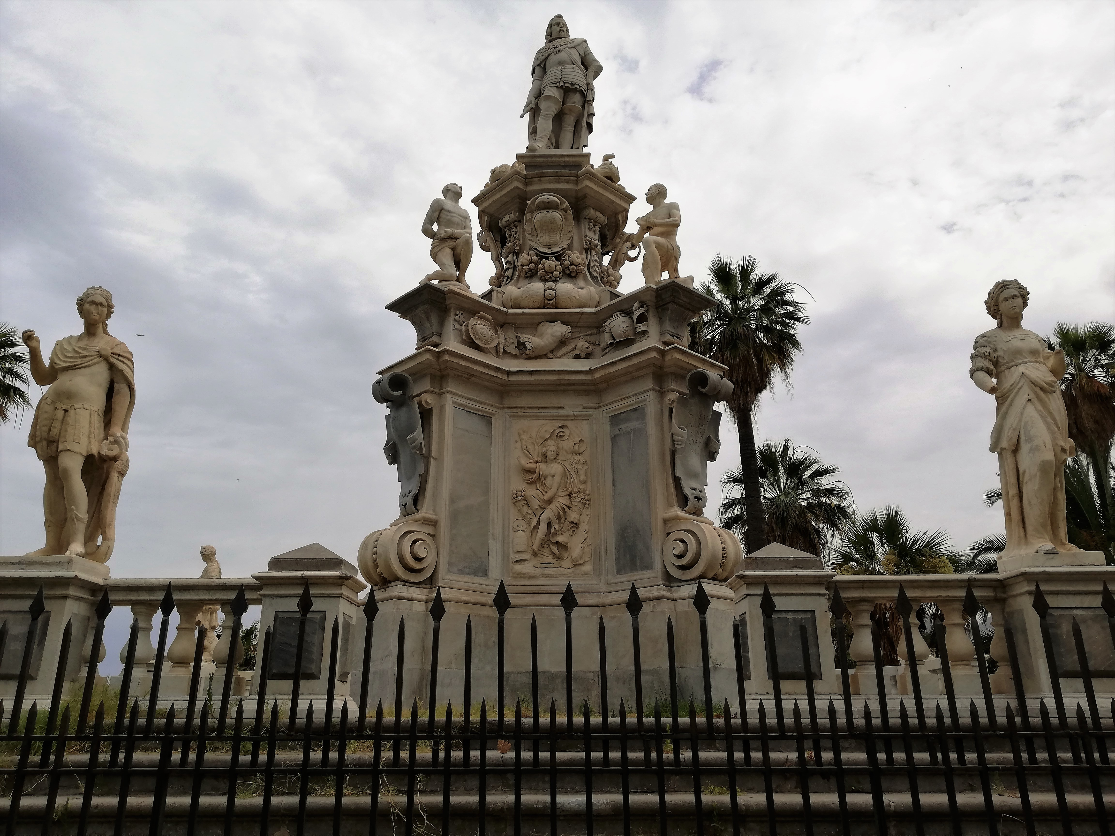 Frontale, lato settentrionale del basamento.